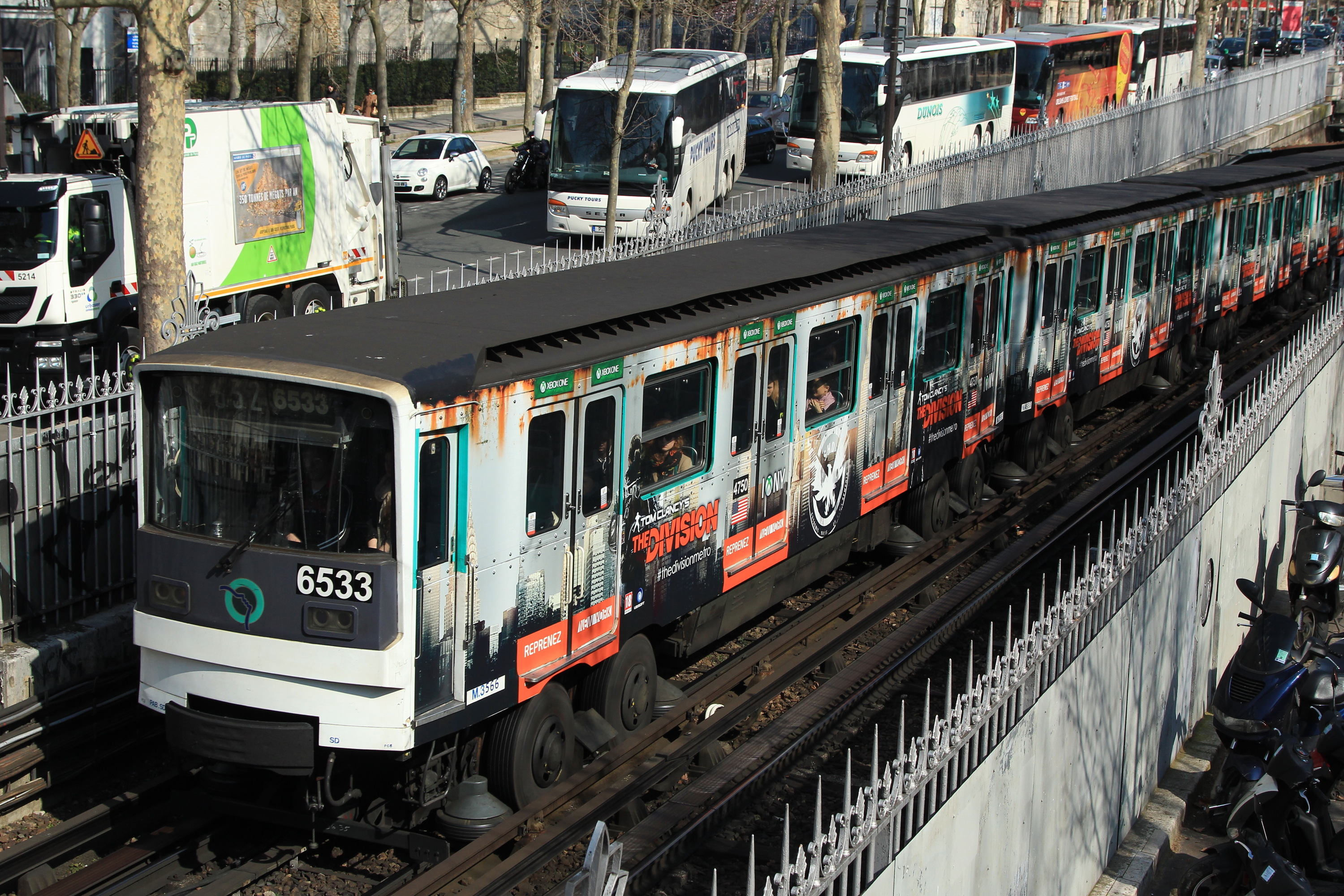 Rame du métro de Paris, sur la ligne 6, pelliculée aux couleurs du jeu vidéo Tom Clancy's The Division, arrive à la station Corvisart.